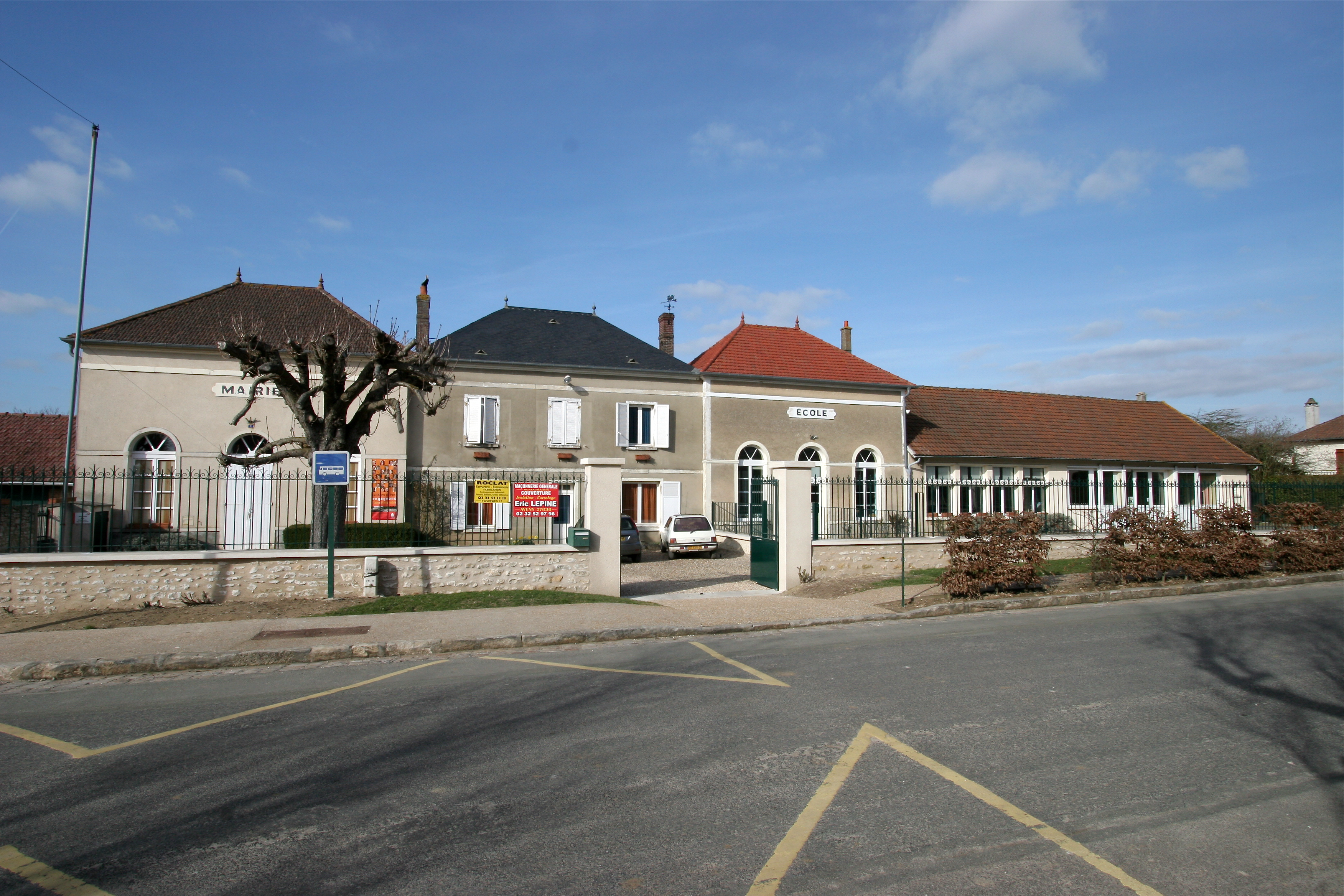 Omerville, Val d'oise, l'école et la mairie